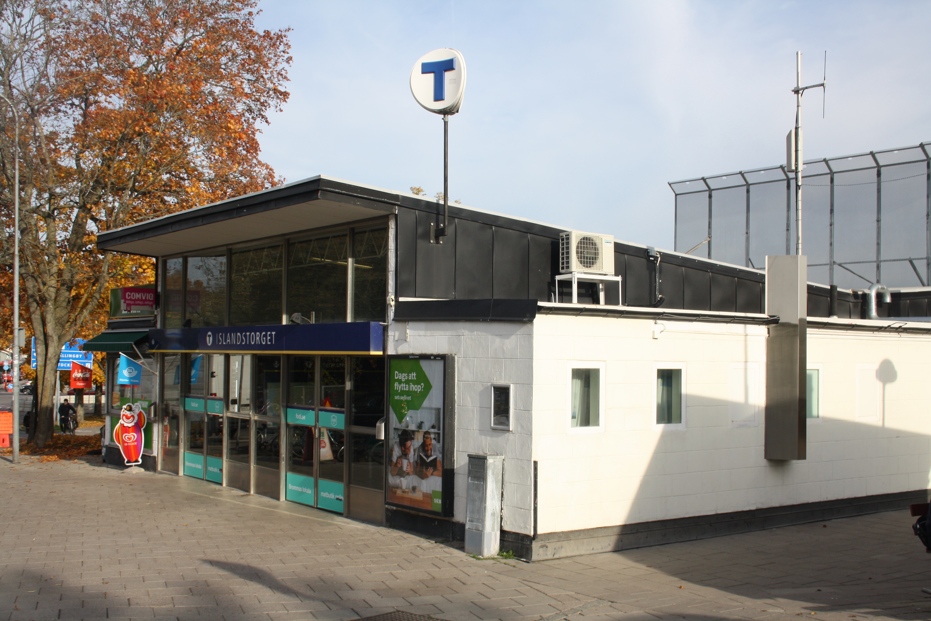 Islandstorget tunnelbana